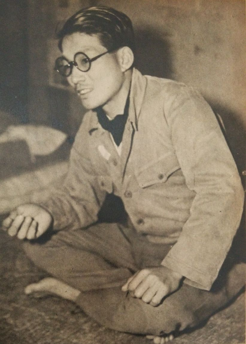 「暁に祈る」事件容疑者、池田重善